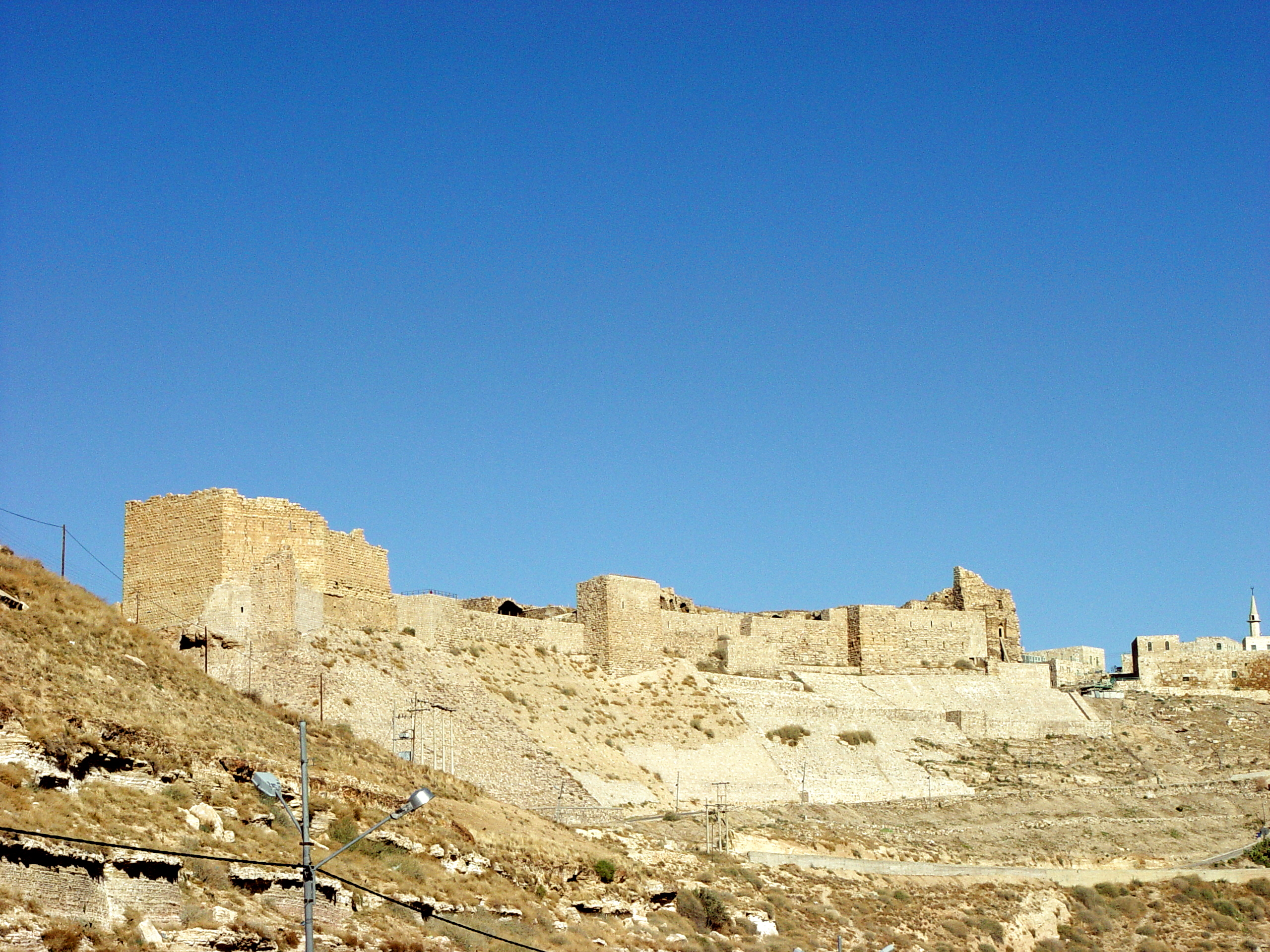 The Karak crusader castle In Karak City in Jordan